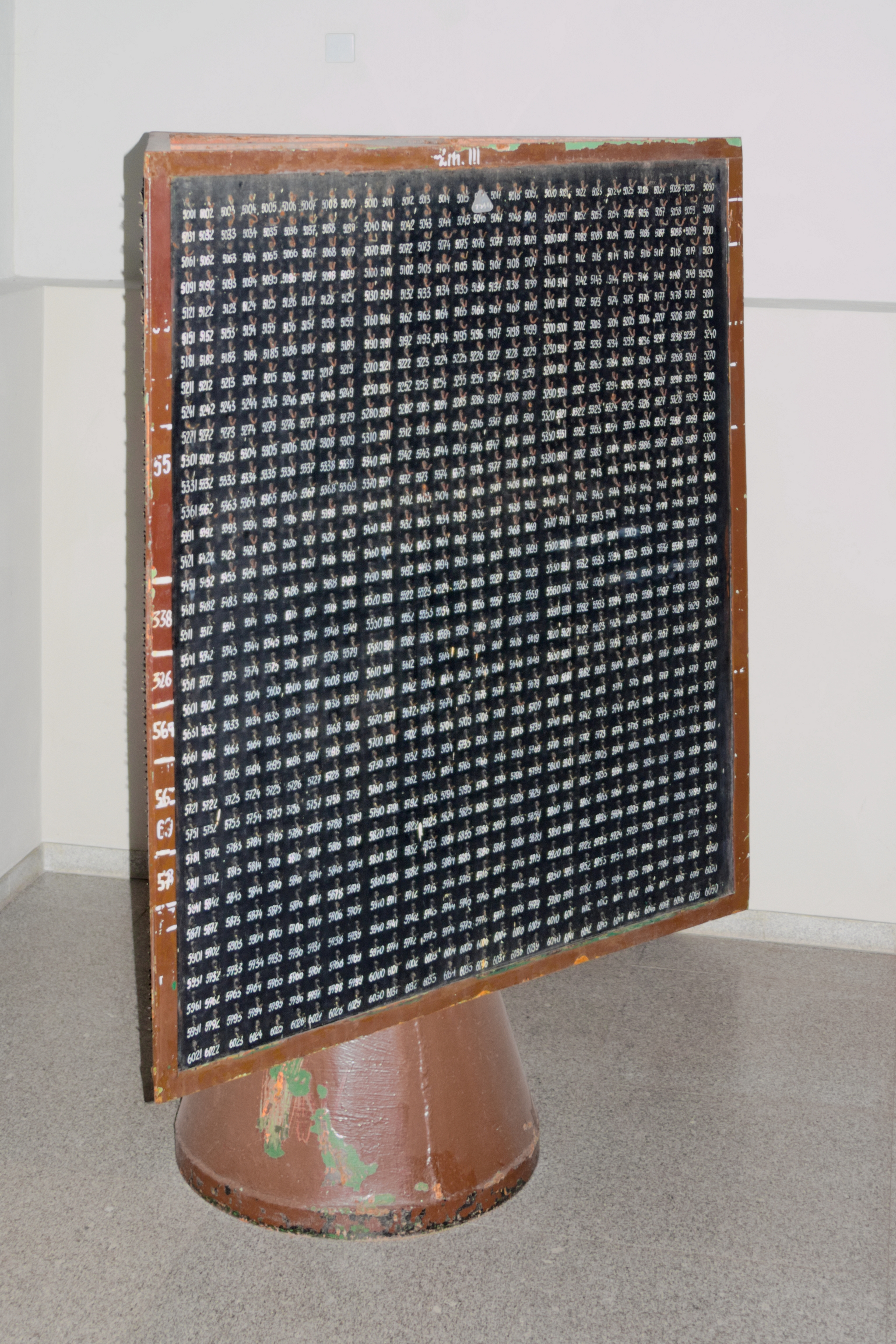 trójstronna tablica marki górnicze eksponowana na terenie Starej Kopalni w Wałbrzychu, widoczna strona dla trzeciej zmiany, wysokość około 2 metry